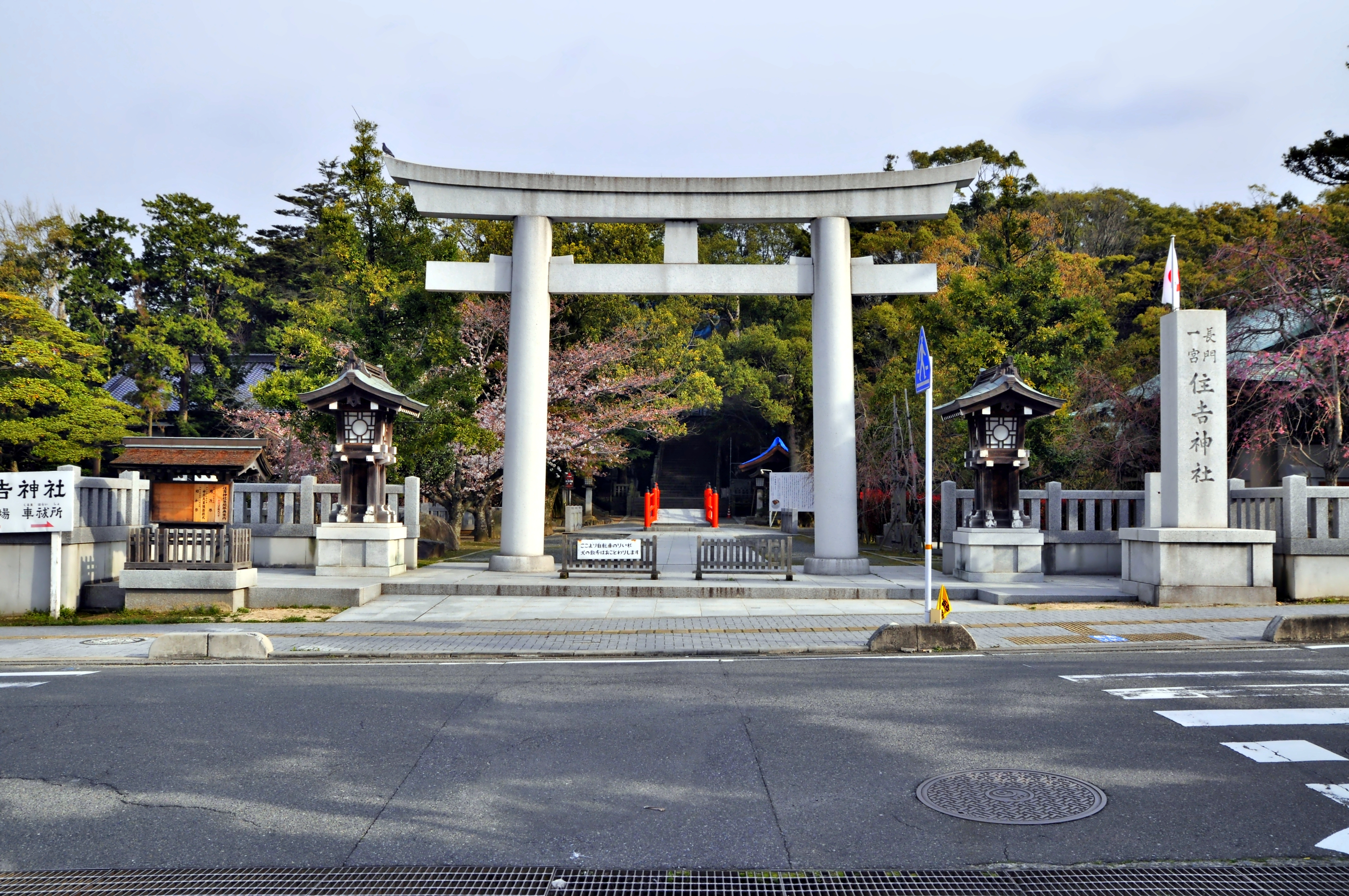 長門一宮住吉神社 (下関市)